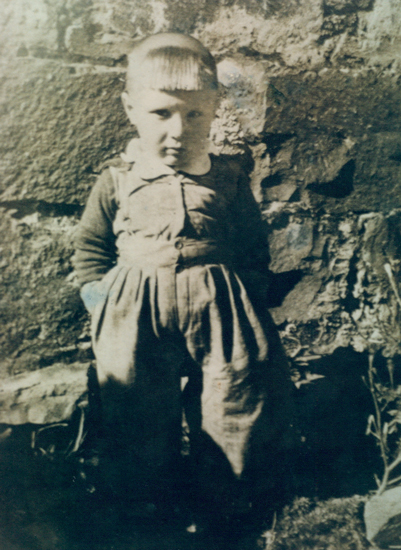 José Ivo Sartori em seus primeiros anos de vida.